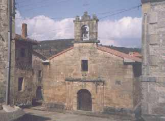 Ermita de santa marina situada en el centro del pueblo